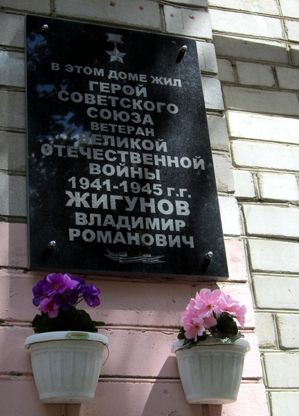 Мемориальная доска Владимиру Романовичу Жигунову в Воронеже (улица Остужева, дом 36).